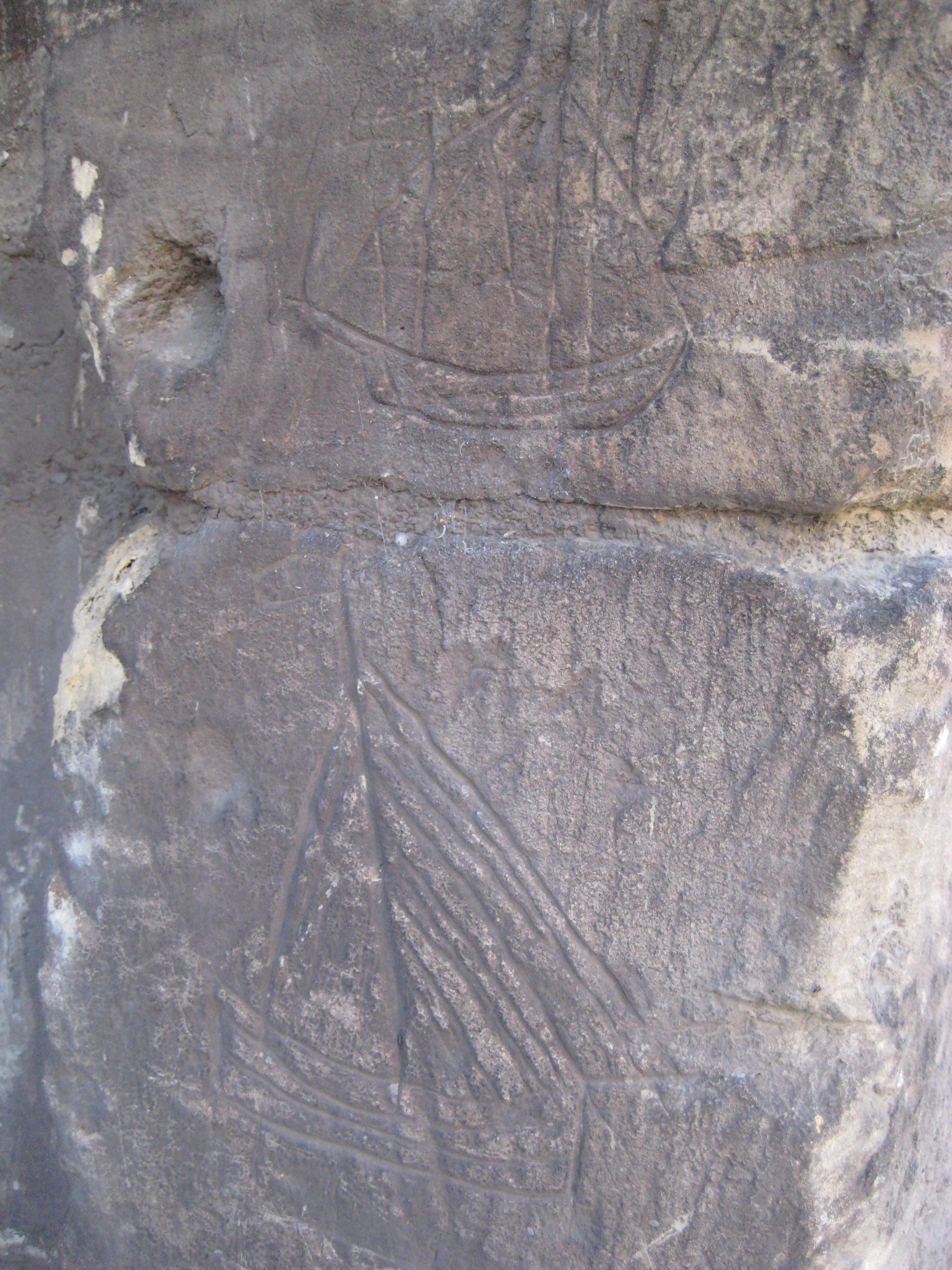 Navires gravés dans la pierre sur le porche d'une ancienne maison (n°9 rue Hippolyte Monin) dans l'ancien village de Colombelles (14)